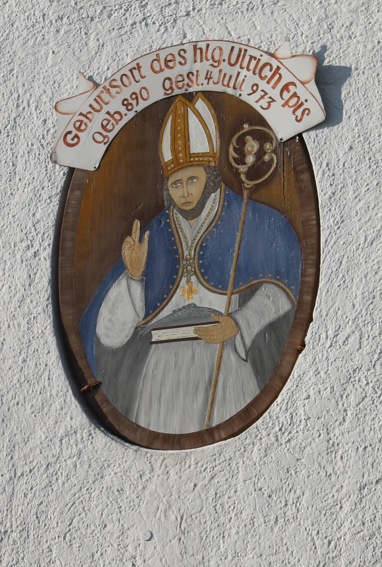 Ulrich von Augsburg, Gemälde an einer Hausfassade gegenüber der Kirche St. Ulrich und Martin in Wittislingen im Landkreis Dillingen an der Donau